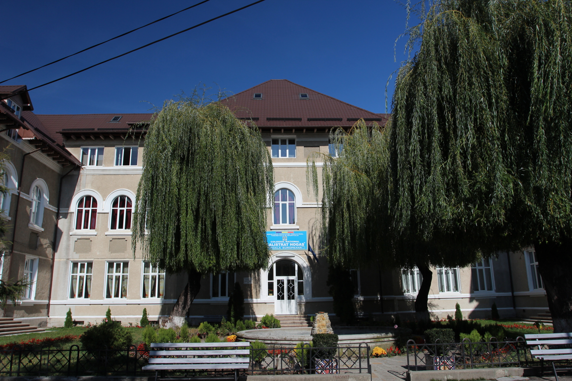 Liceul "Calistrat Hogaș"